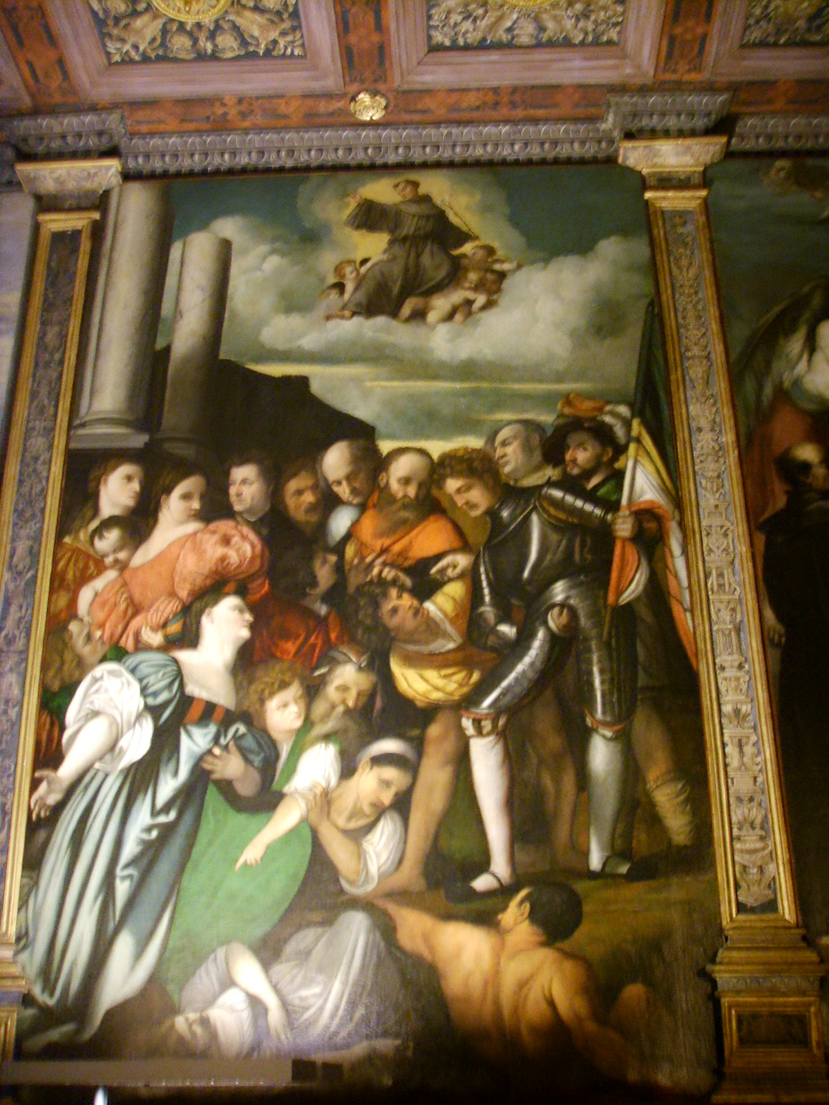 6 Domenico Campagnola (attribuzione), Risurrezione di una ragazza annegata (XVI secolo)